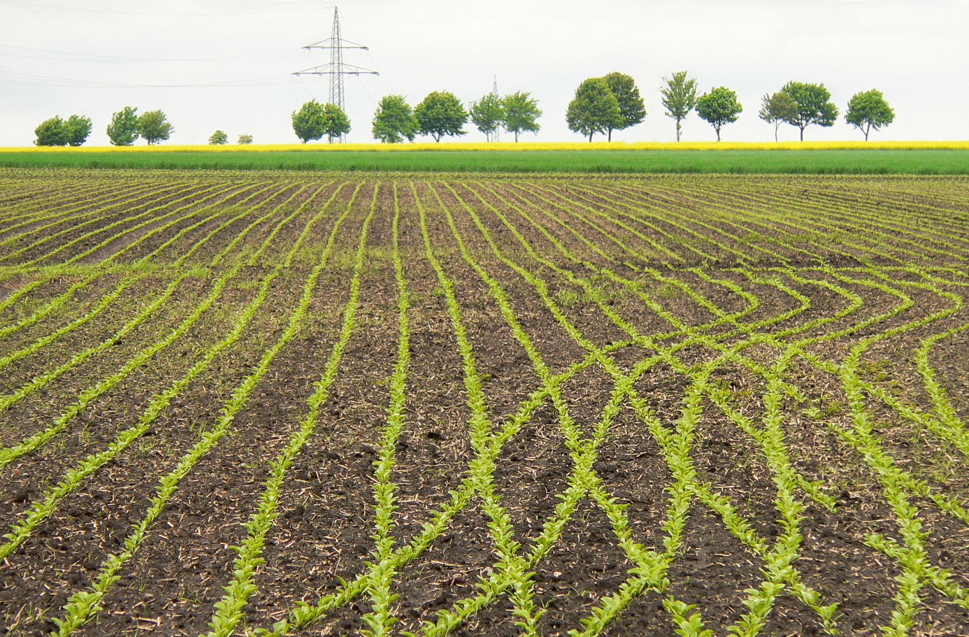 Aussaat von Zuckerrübensaat bei Machtsum auf Schwarzerde